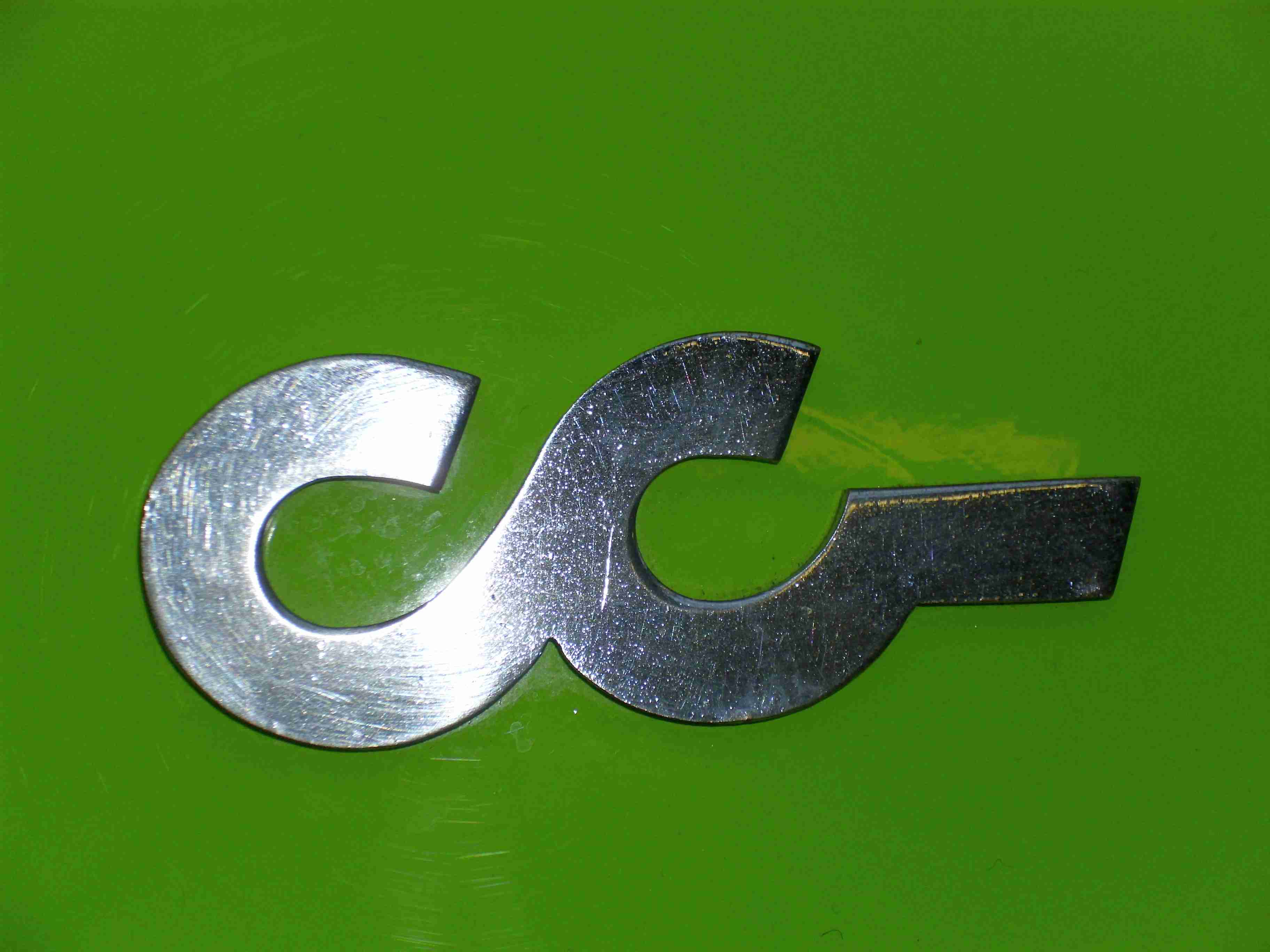 Emblem CG